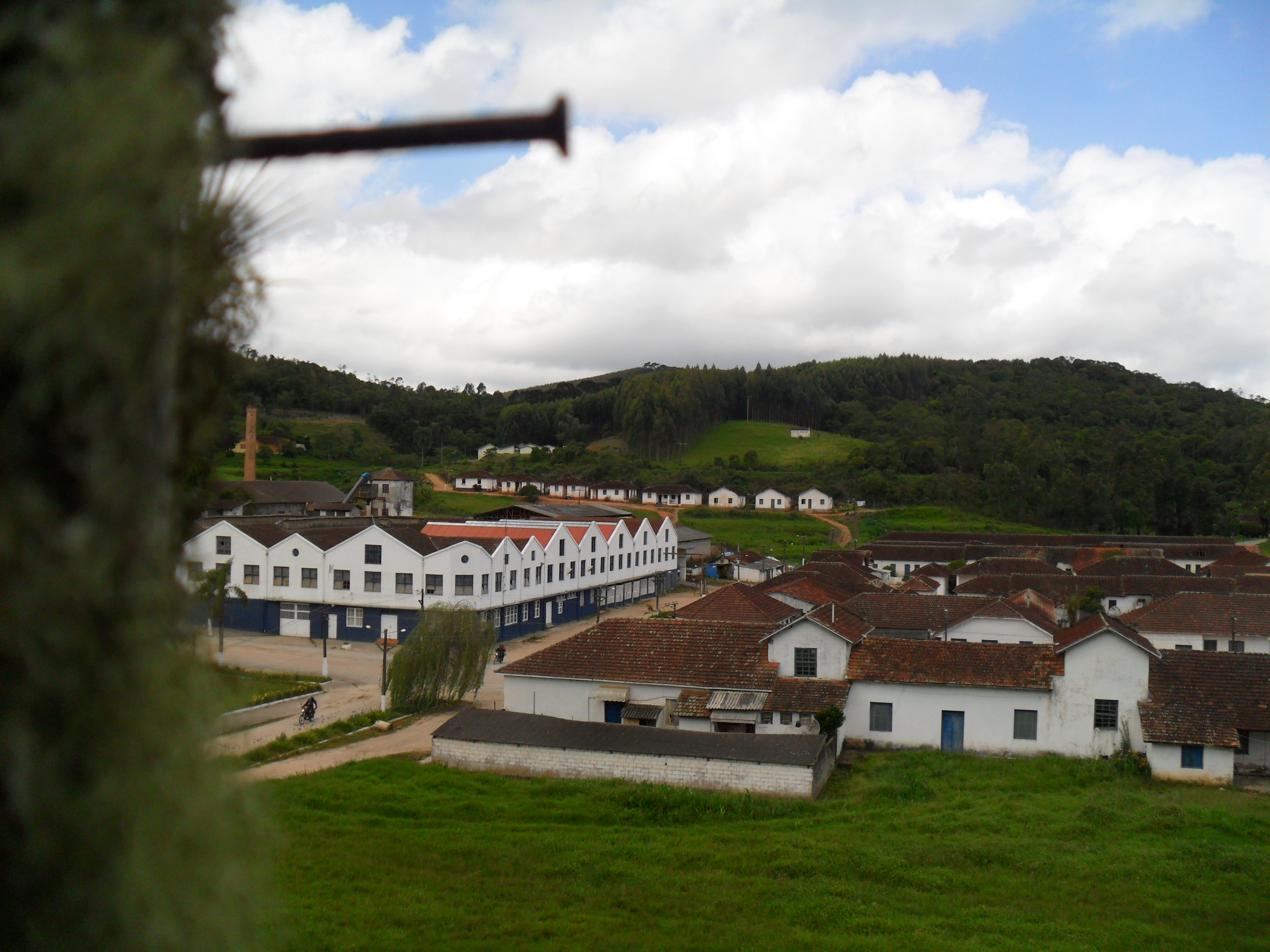 Descrição_para_sua_foto